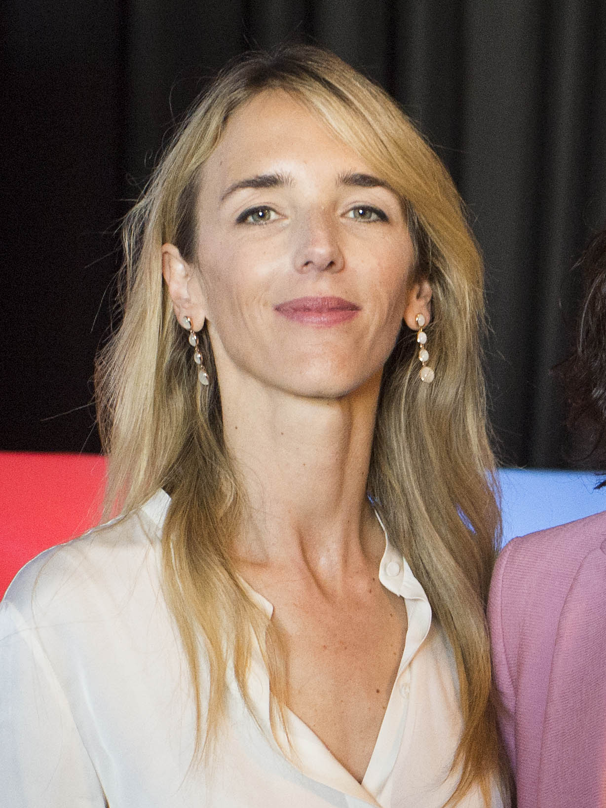 Presentación de los número 1 al congreso por cada provincia.